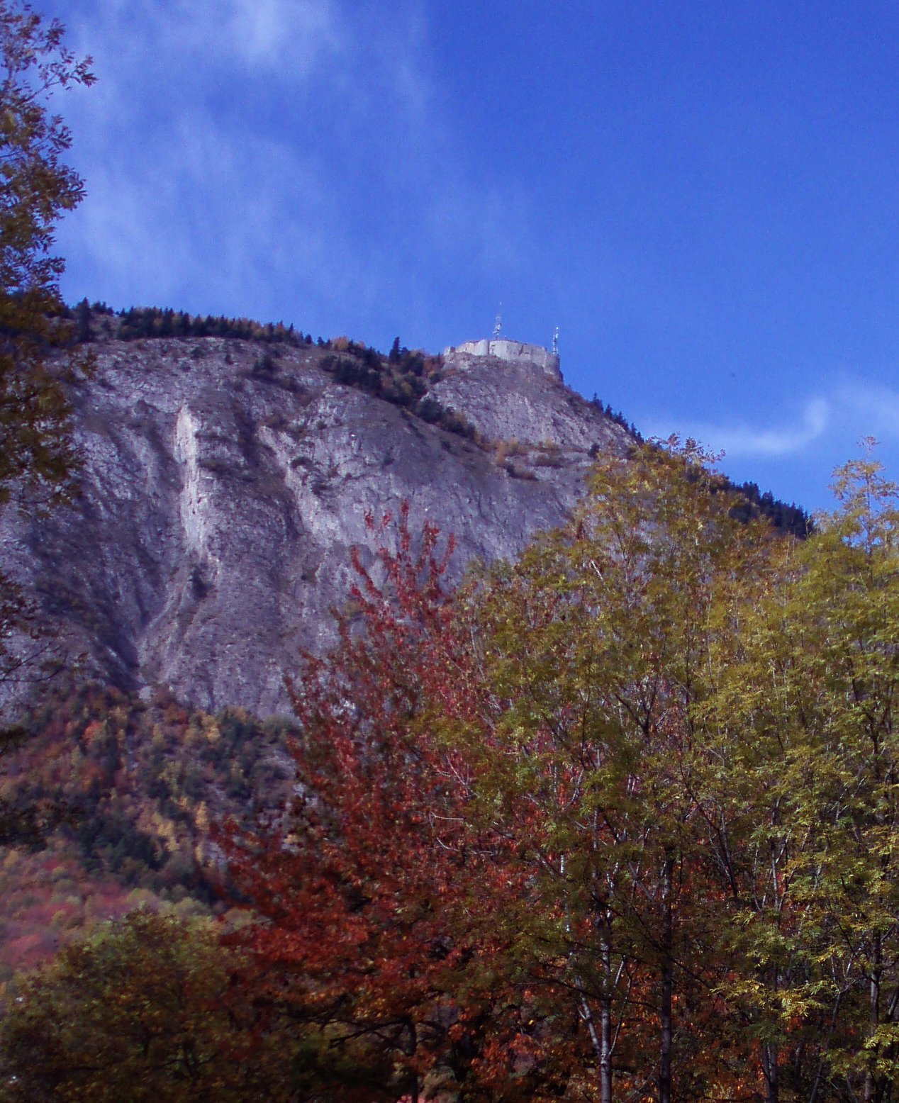 Le Fort situé sur le col du télégraphe